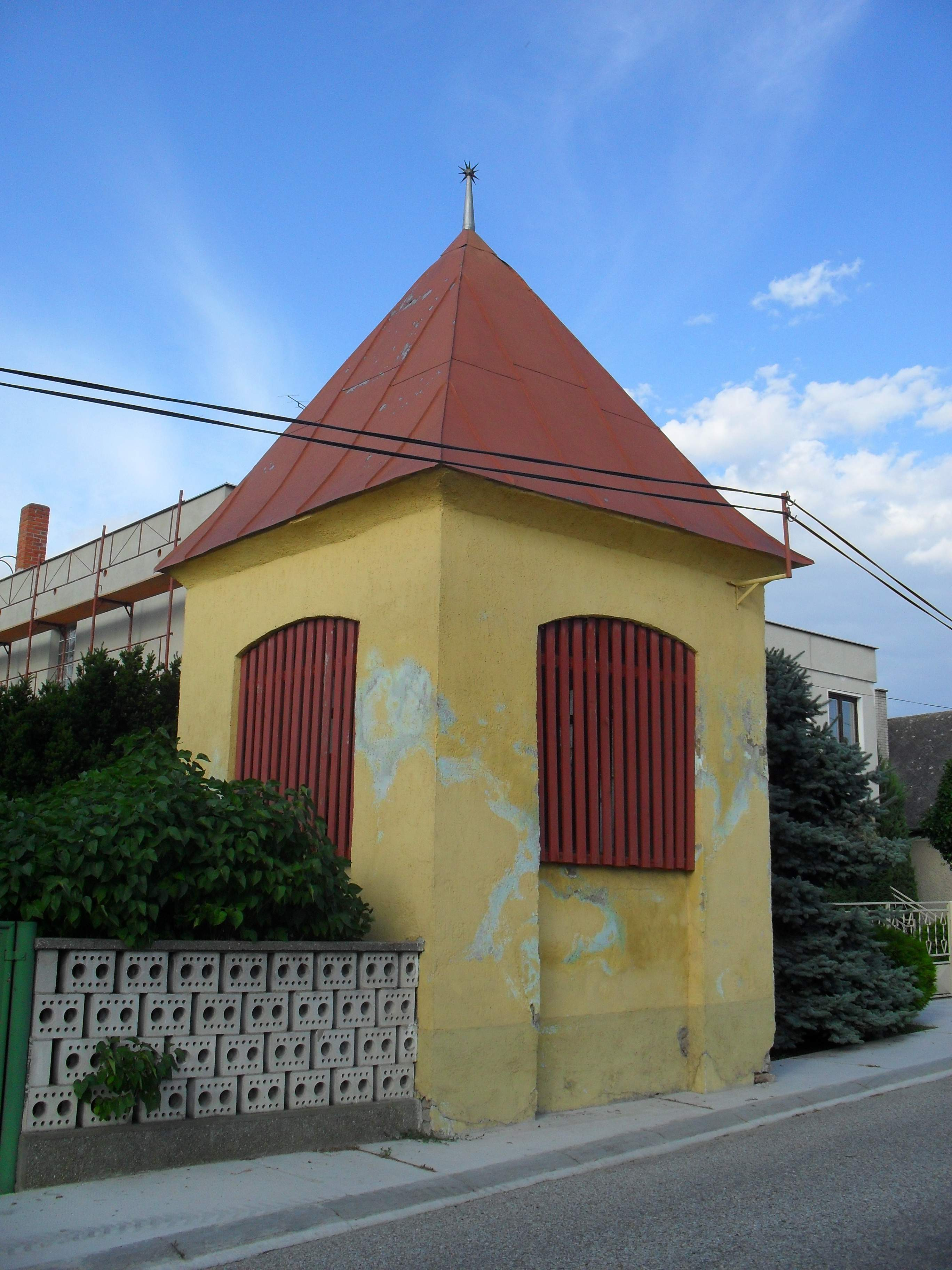 Szilas - református harangláb